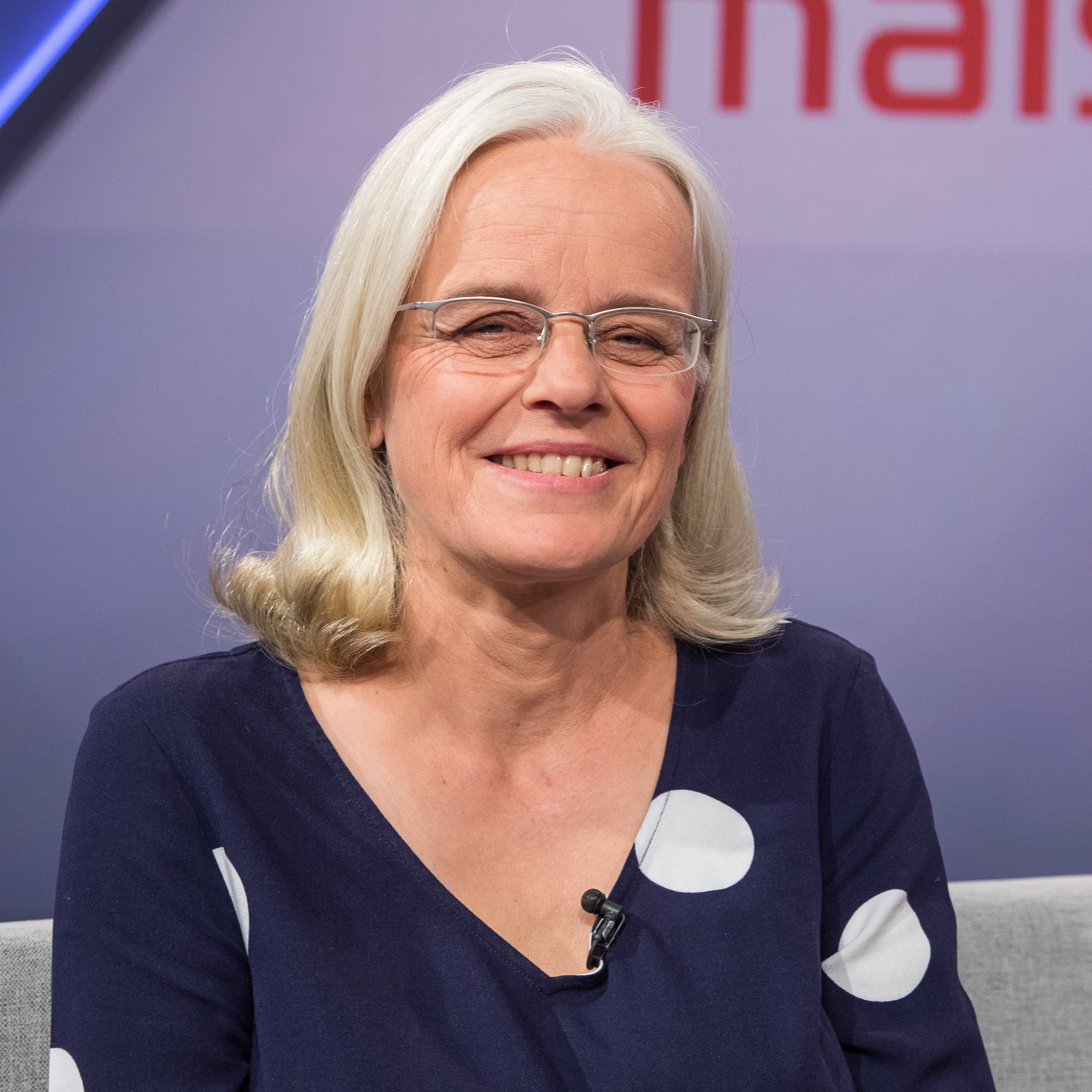 MAISCHBERGER am 6. März 2019 in Köln. Produziert vom WDR. Thema der Sendung: „Attacke auf die Reichen: Beschimpfen, besteuern, enteignen?“ Foto: Ulrike Herrmann, Journalistin